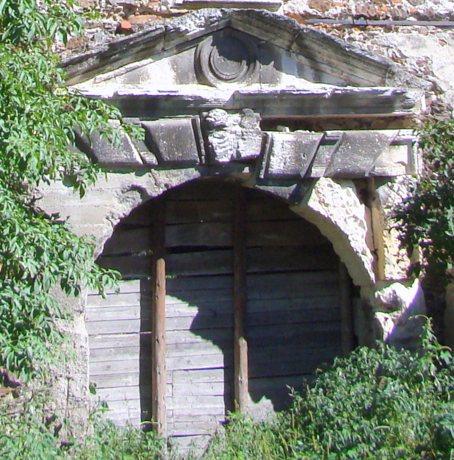 Poartă, oraș Șimleu Silvaniei, Str. Bathory Stefanus 1 03